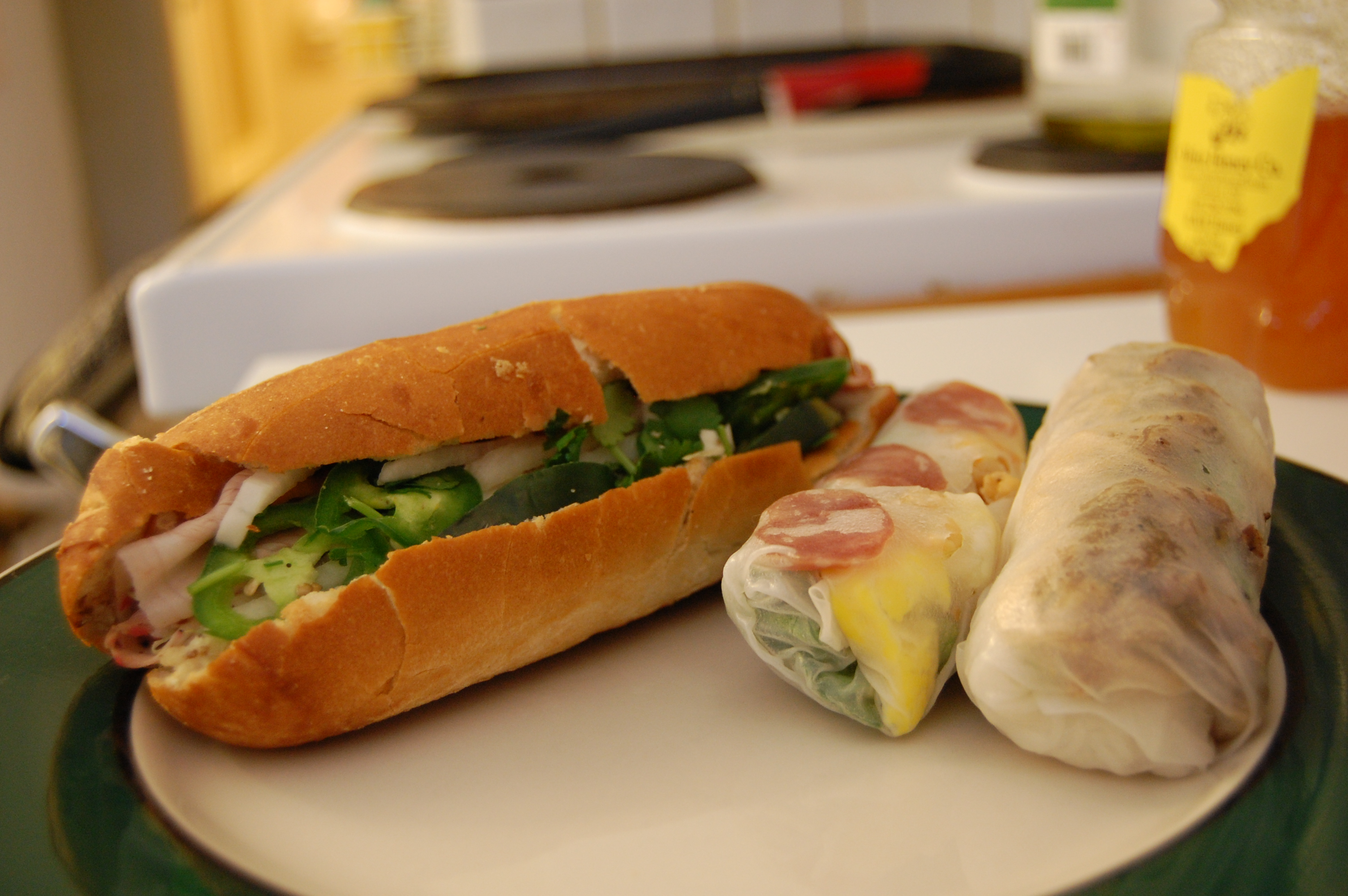 Bánh mì (Vietnamese sandwich) and Bánh cuốn. Banh mi and banh cuon.